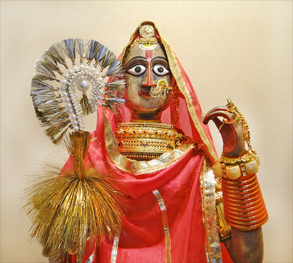 Statue en argent de la déesse Gangaur habillée et décorée dans la tradition rajpute (détail) dimensions 128 x 75 cm 19ème siècle provenance : Marwar musée du fort Meherangarh, Jodhpur La déesse Gangaur est l'une des incarnations de Parvati, la parèdre ou consort de Shiva. La déesse était implorée par les femmes mariées pour la longévité de leurs maris et par les jeunes filles pour trouver un bon époux.